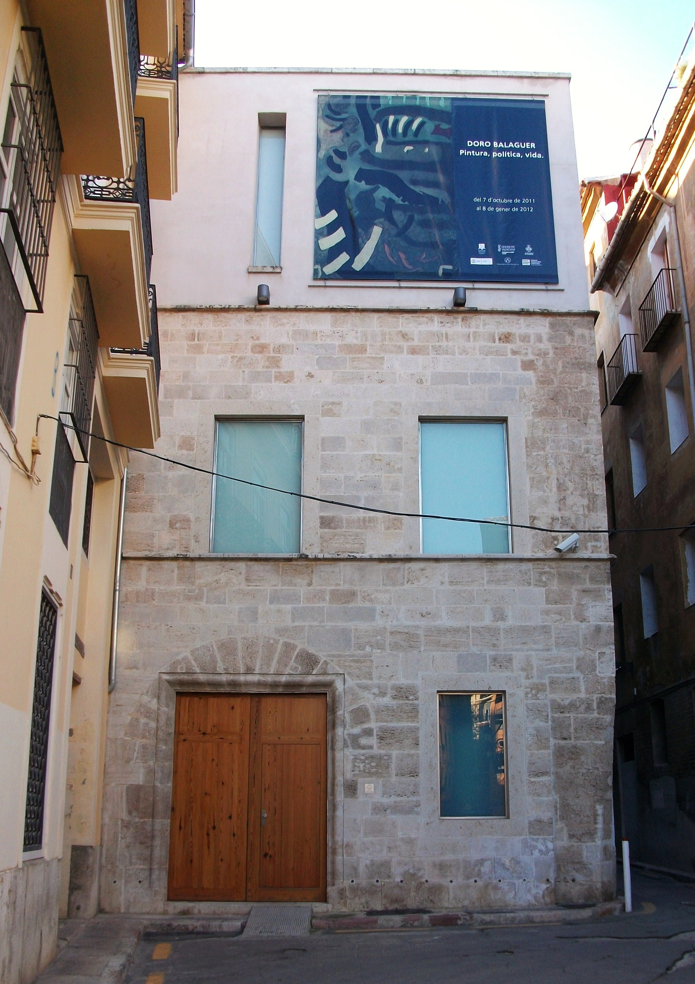 Fundació Chirivella Soriano, València.